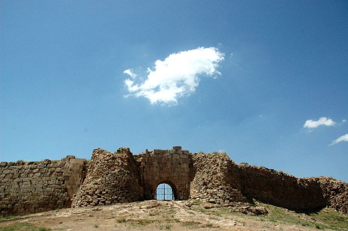 تخت سلیمان - دروازه قلعه